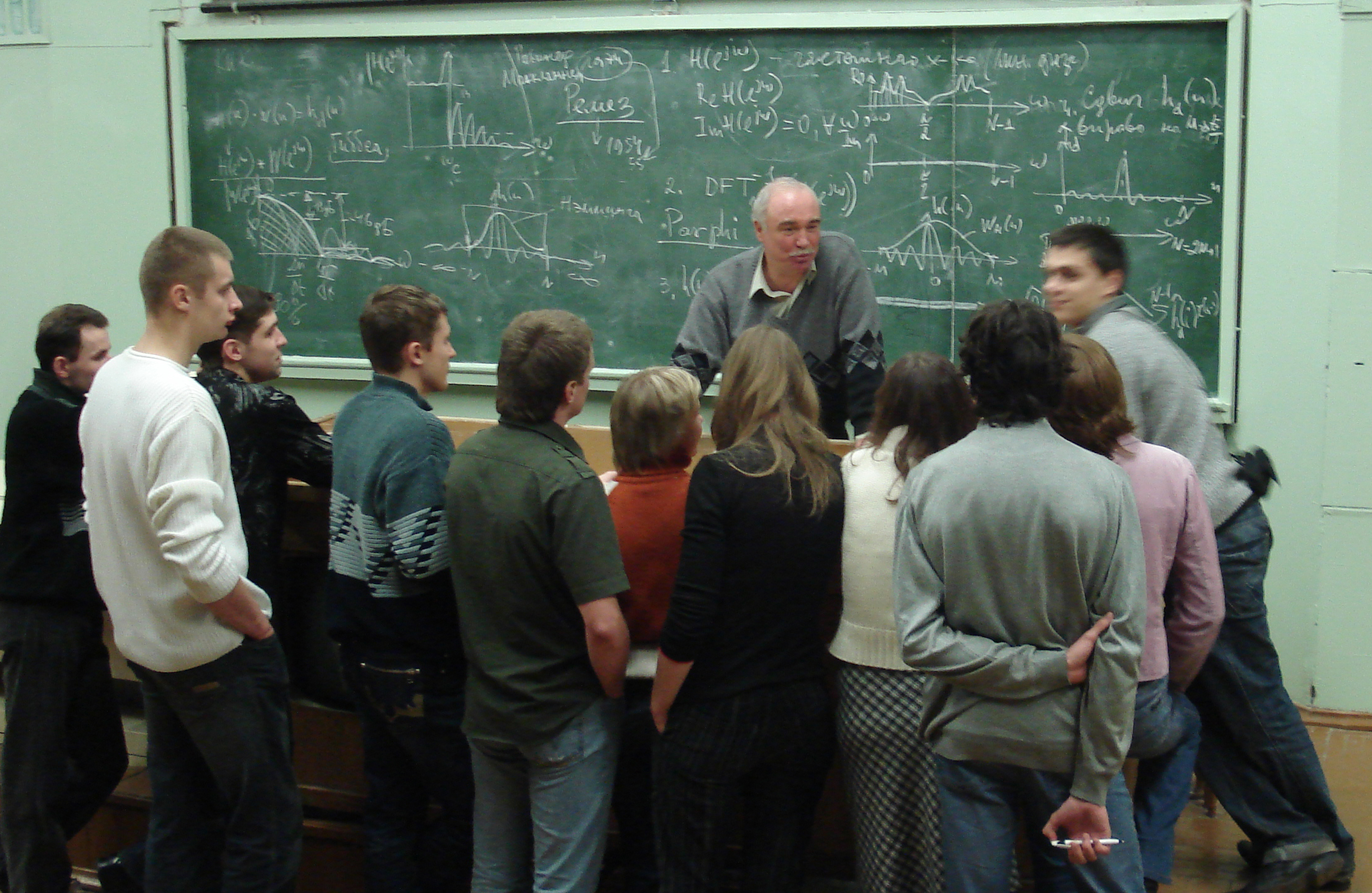 проф. Петровский со студентами (2006 г.)